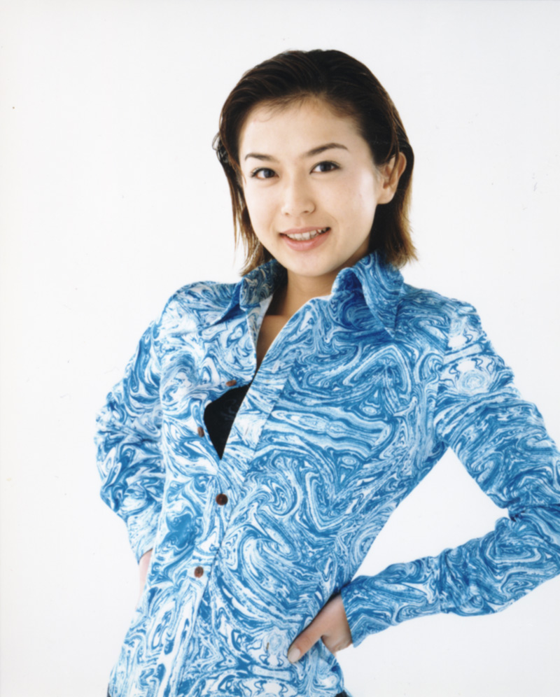 たかはしさん